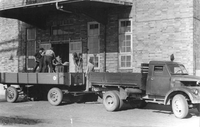 VEAB Rostock, Anlieferung von Korn ZB-Pietsch-28.7.1953 Das erste Getreide dem Staat. Unter der Losung "Das erste Getreide dem Staat" liefern die Genossenschaftsbauern der Produktionsgenossenschaft "Karl Marx" aus Brodersdorf ihren Roggen ab. UBz: Der Lastkraftwagen der Produktionsgenossenschaft vor dem Hafenspreicher der VHAR in Rostock.